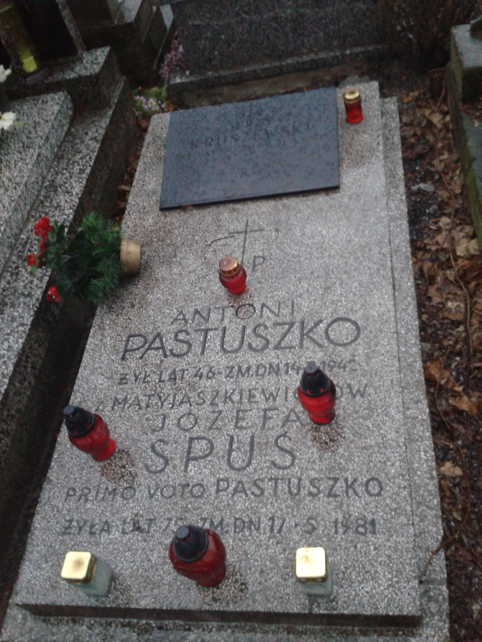 Grób prof. Jerzego Kruszewskiego